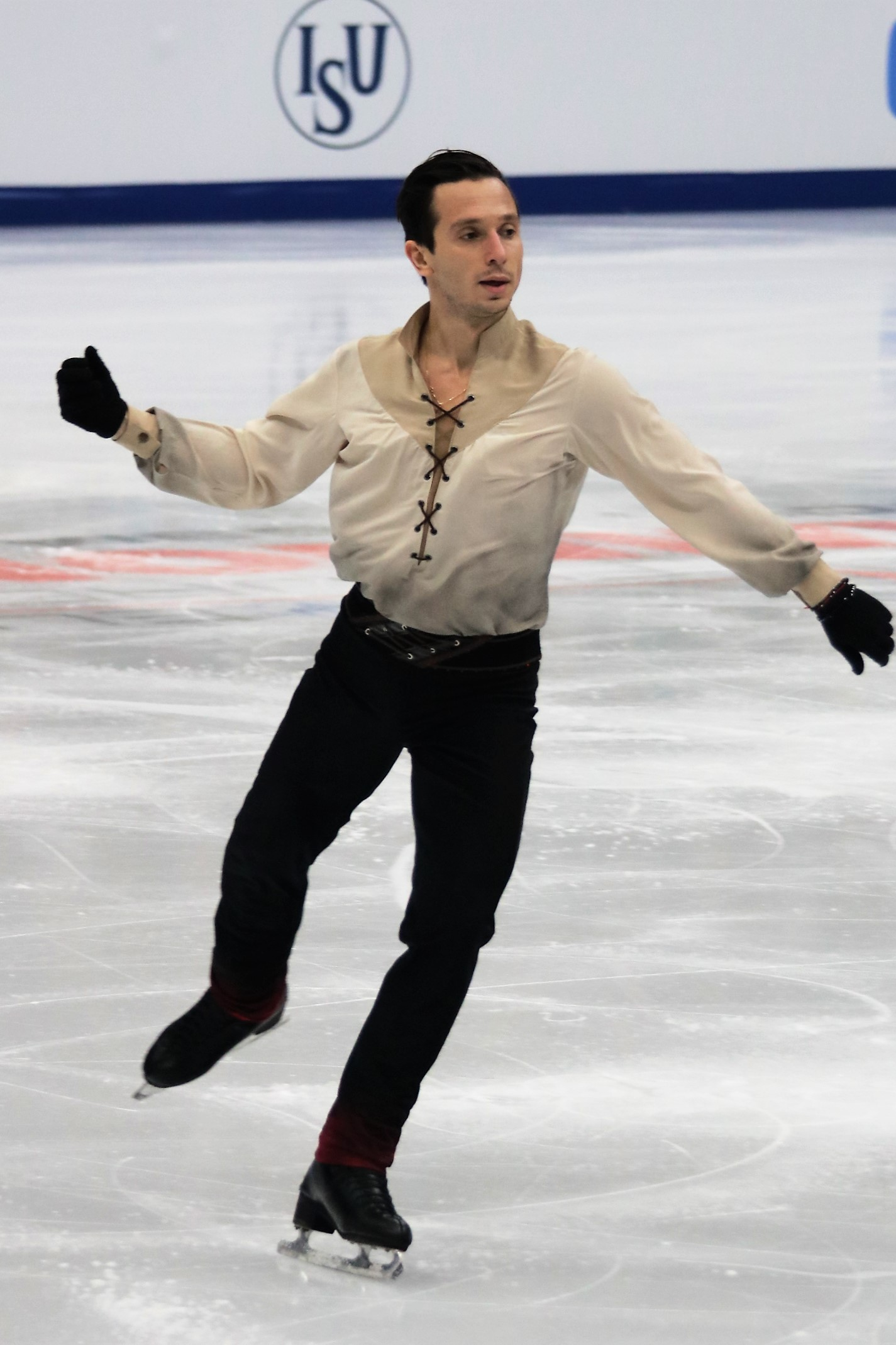 Алексей Быченко (Израиль) на Чемпионате Европы по фигурному катанию 2018.